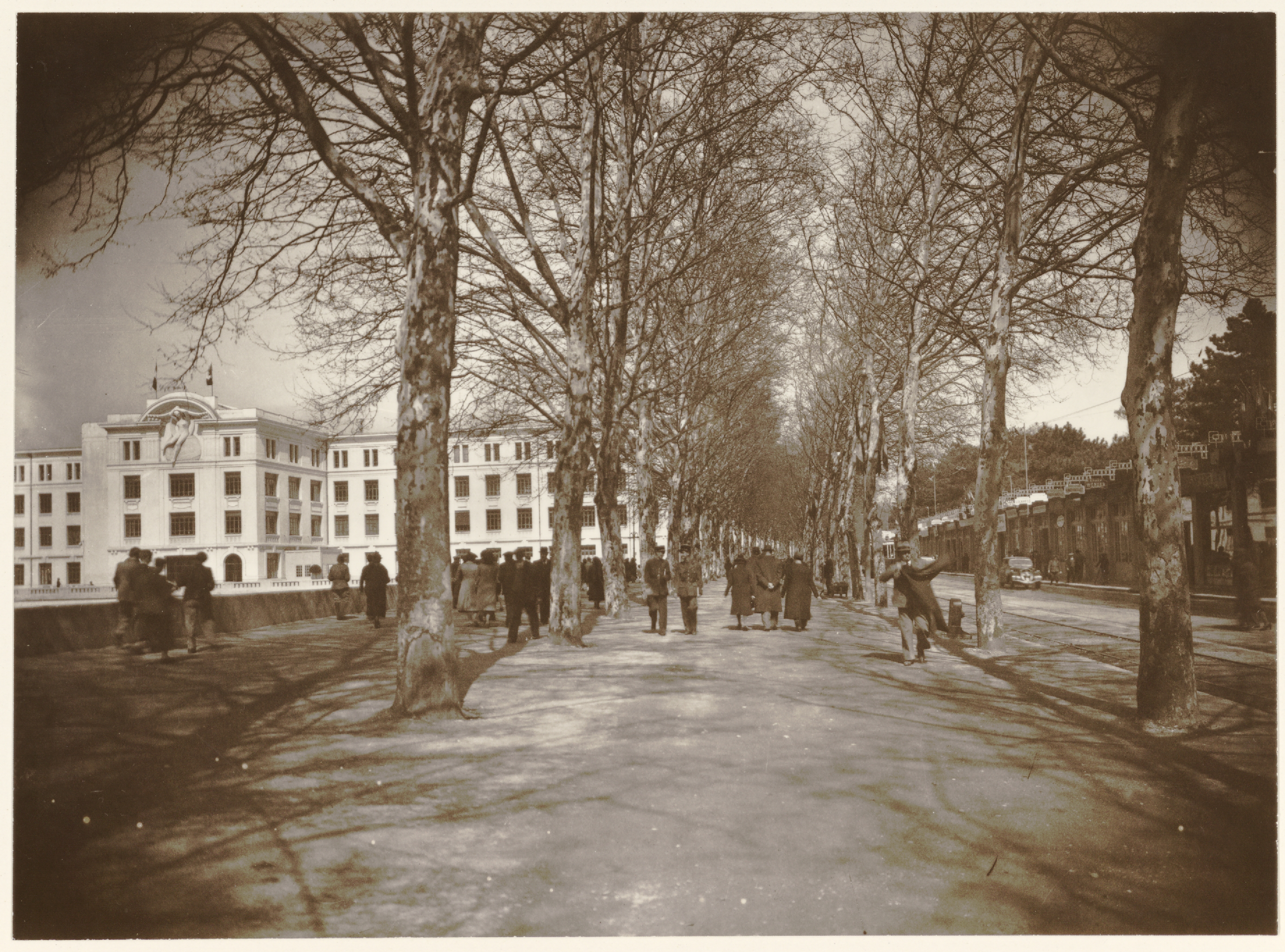 Foire internationale de Lyon - Palais de la Foire, quai Achille-Lignon, Villeurbanne, vers 1950